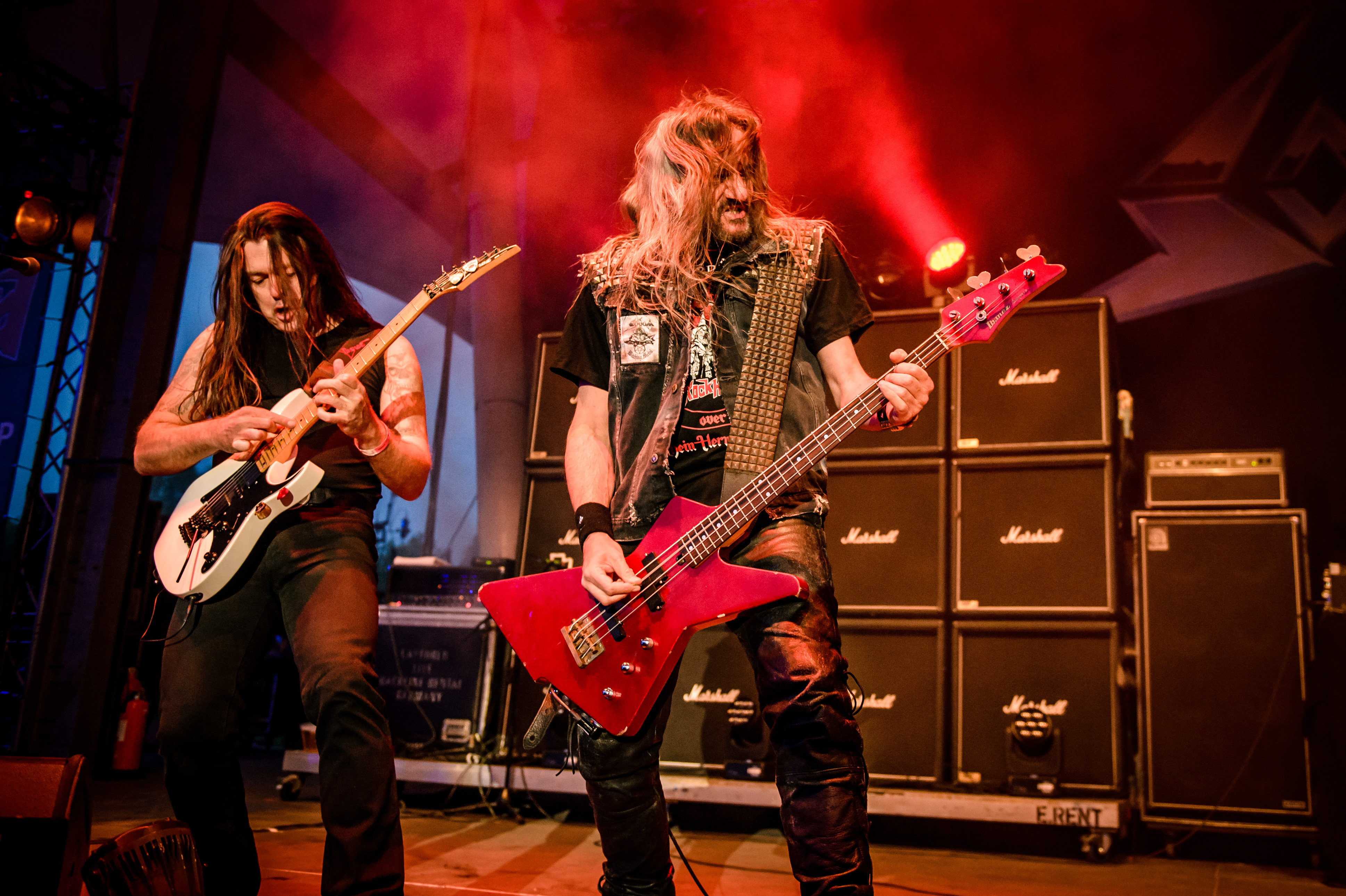 'Rock Hard Festival 2018; Amphitheater Gelsenkirchen': 'Sodom'